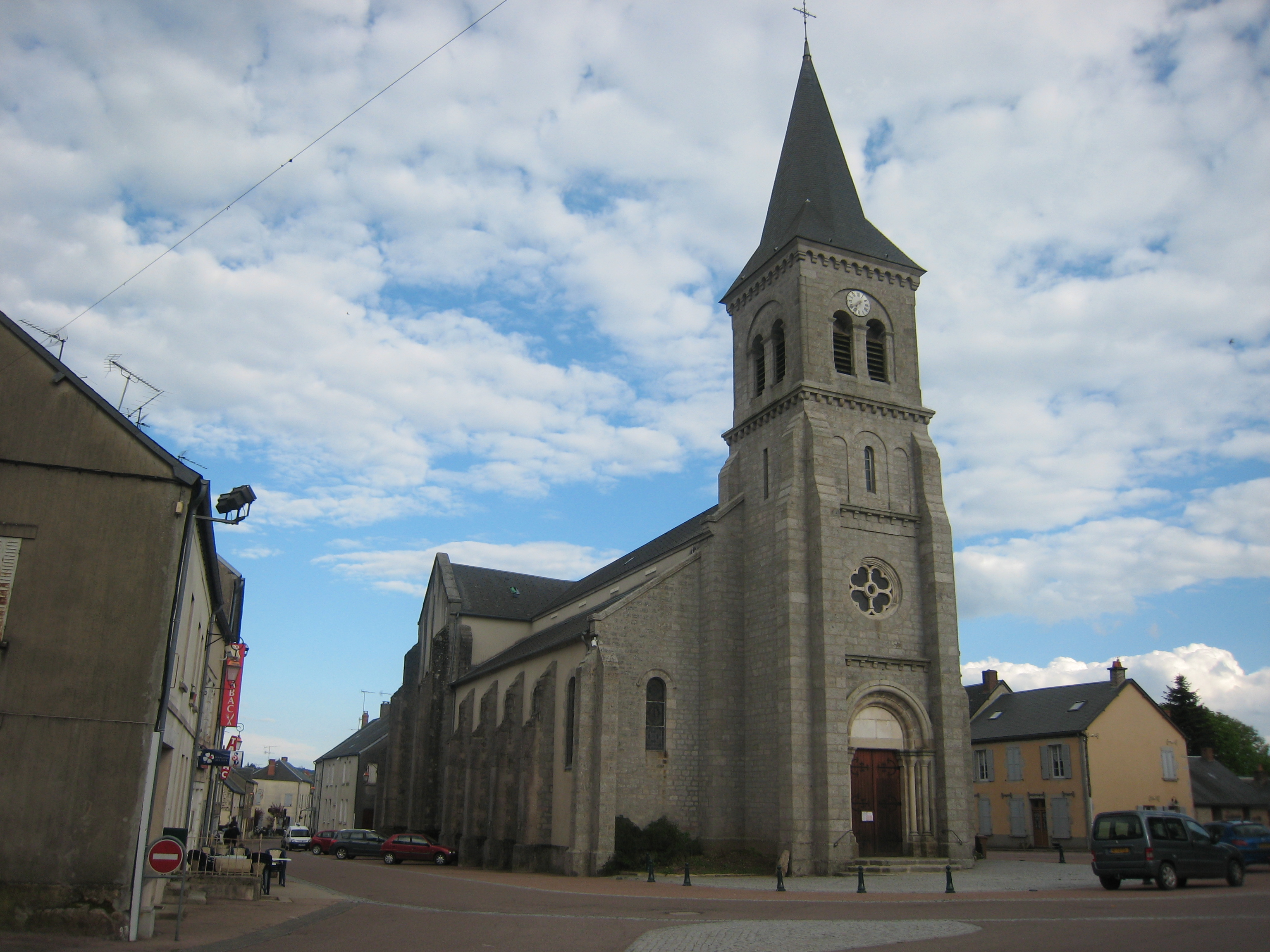 École de Ouroux-en-Morvan